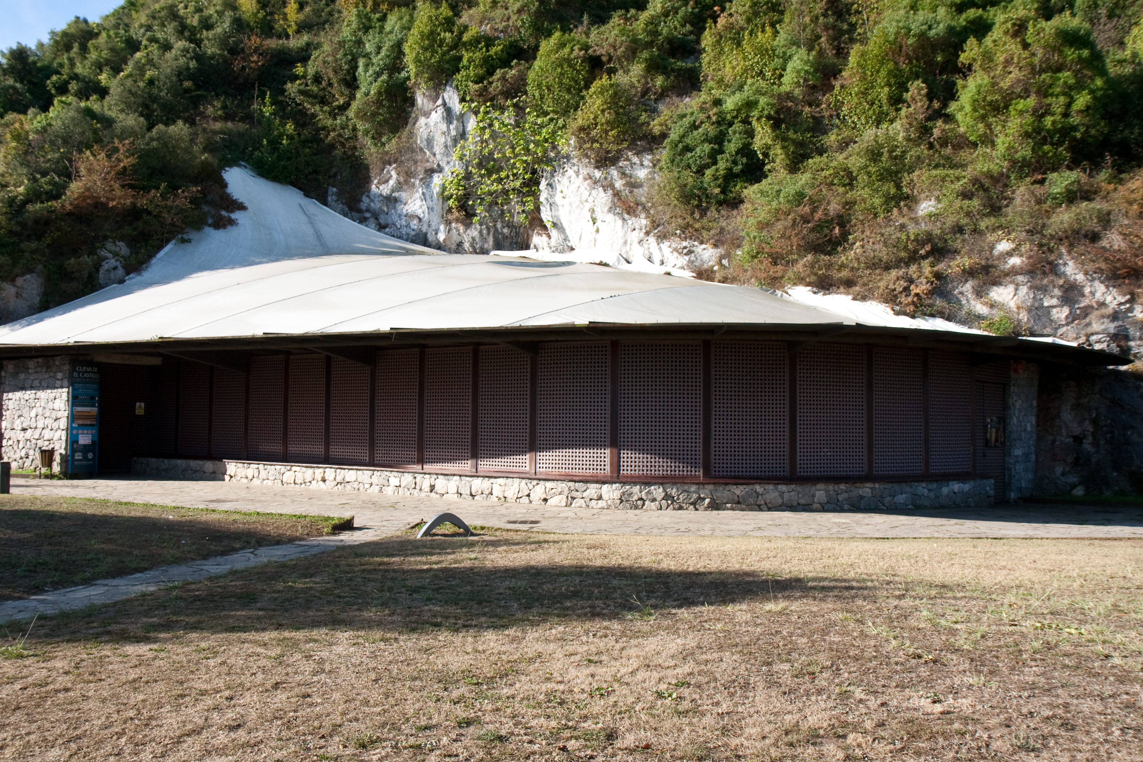 Cuevas de las Monedas y de las Chimeneas